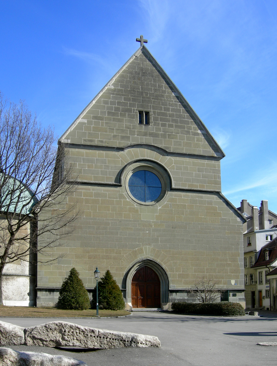 Fribourg, façade de l'église Saint-Michel